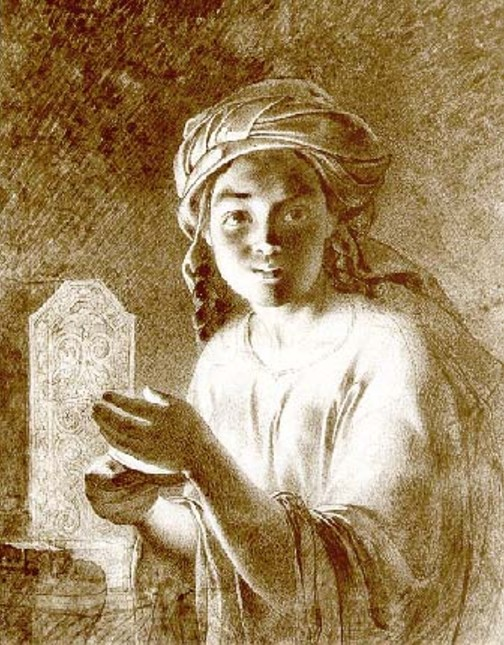 Katya, meisje uit Kazachstan. Sepia op papier, 1856-1857.